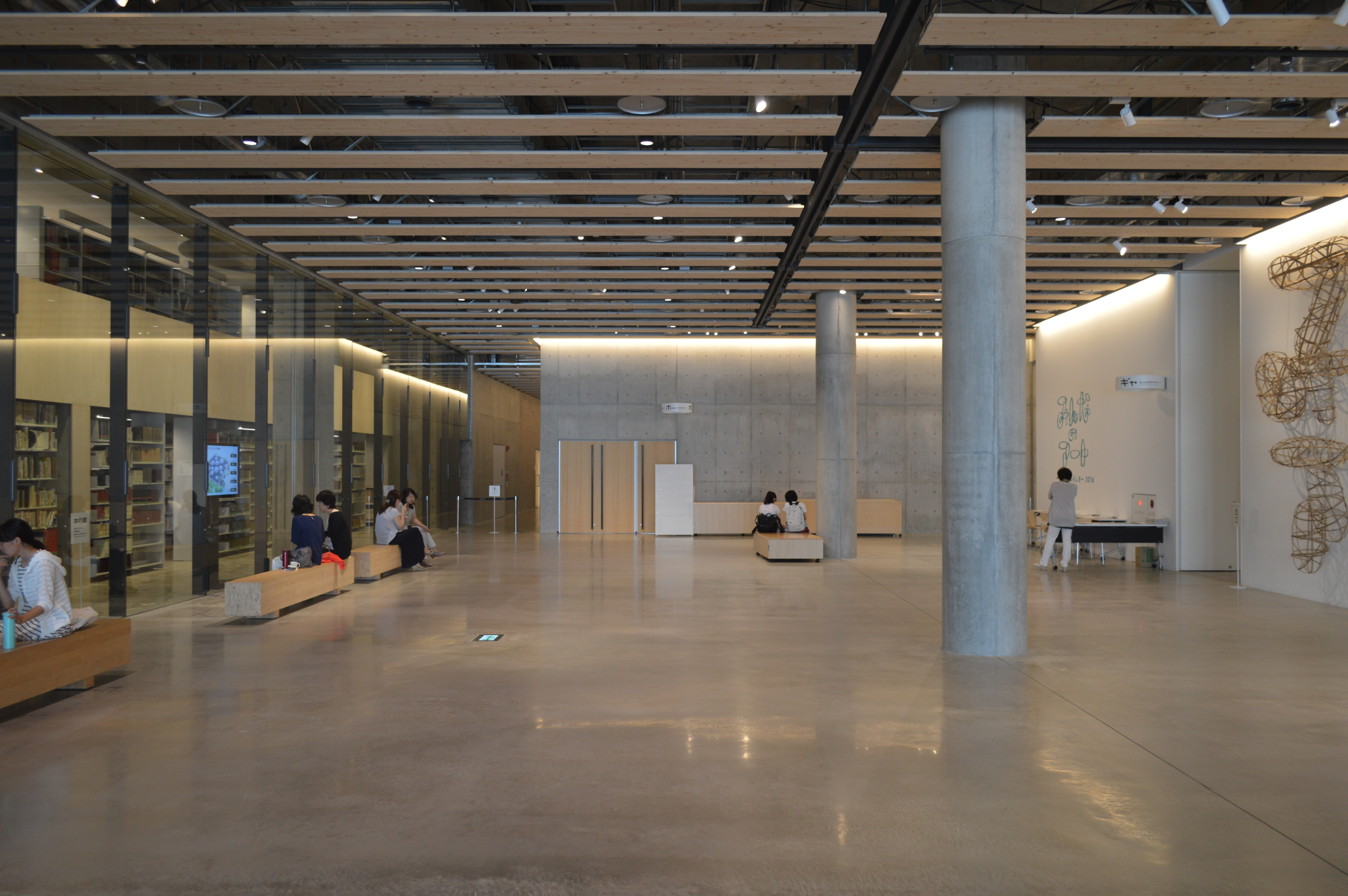 岐阜県岐阜市にあるみんなの森 ぎふメディアコスモス1階の「ギャラリーホワイエ」。左は開放書庫。奥はみんなのホール。右は「みんなのギャラリー」。